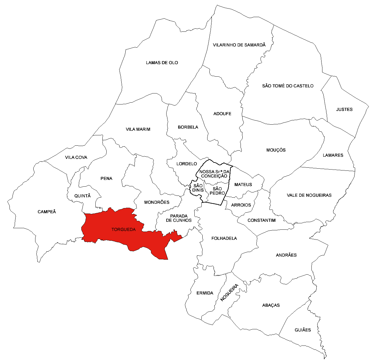 Freguesia de Torgueda (concelho de Vila Real)